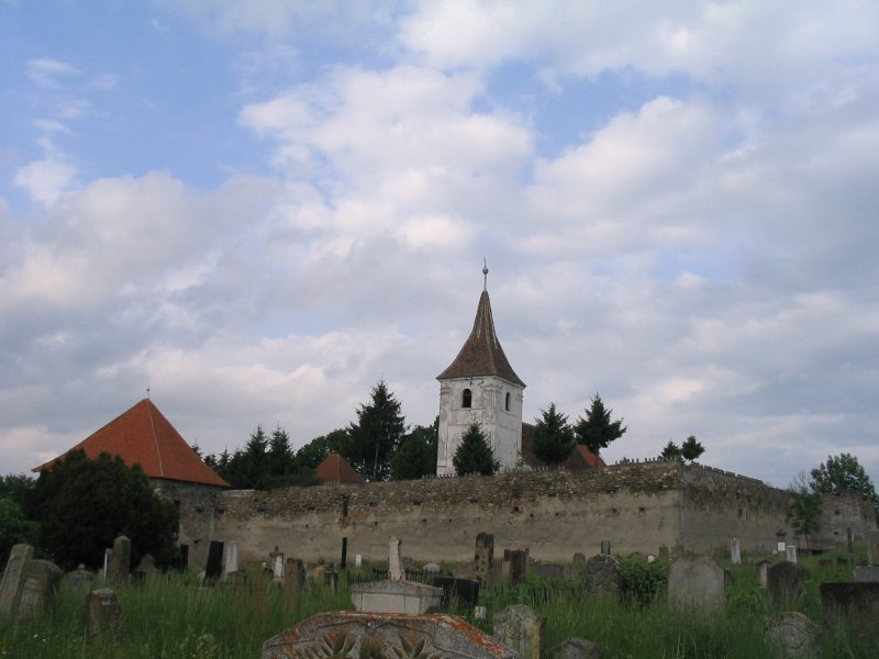 Nagyajta unitárius vártemplom, 2005